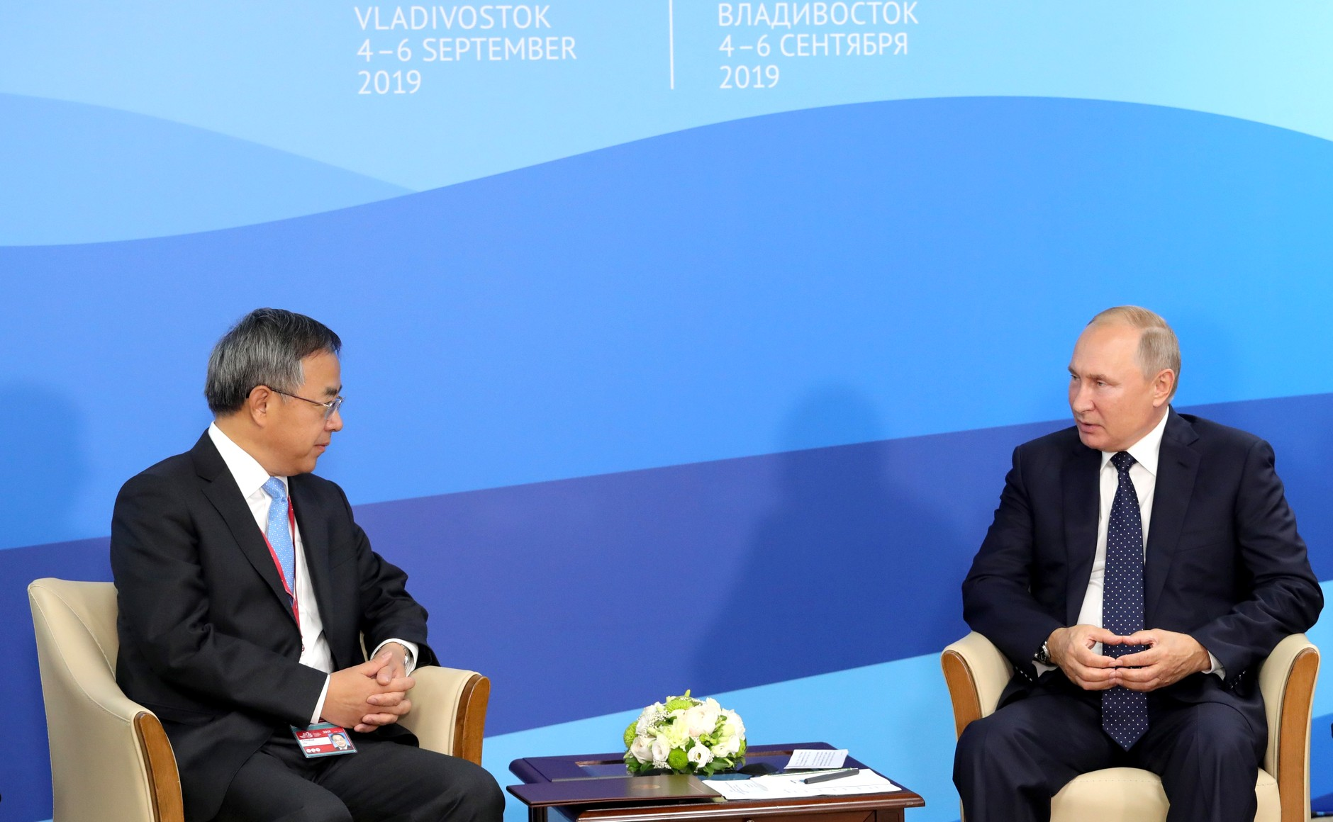 Встреча с заместителем Премьера Госсовета КНР Ху Чуньхуа